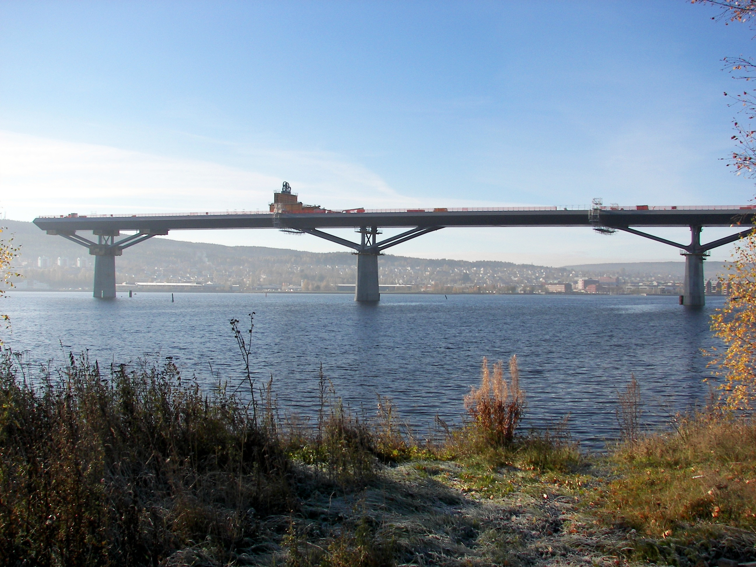 Sundsvallsbron sett från Industrigatan öster om norra brofästet.